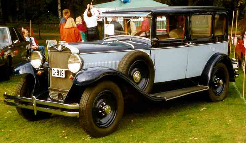 Fiat 525 Berlina (1931 - 1933)